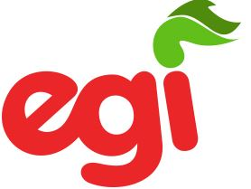 Nuevo logo Euzko Gaztedi Indarra